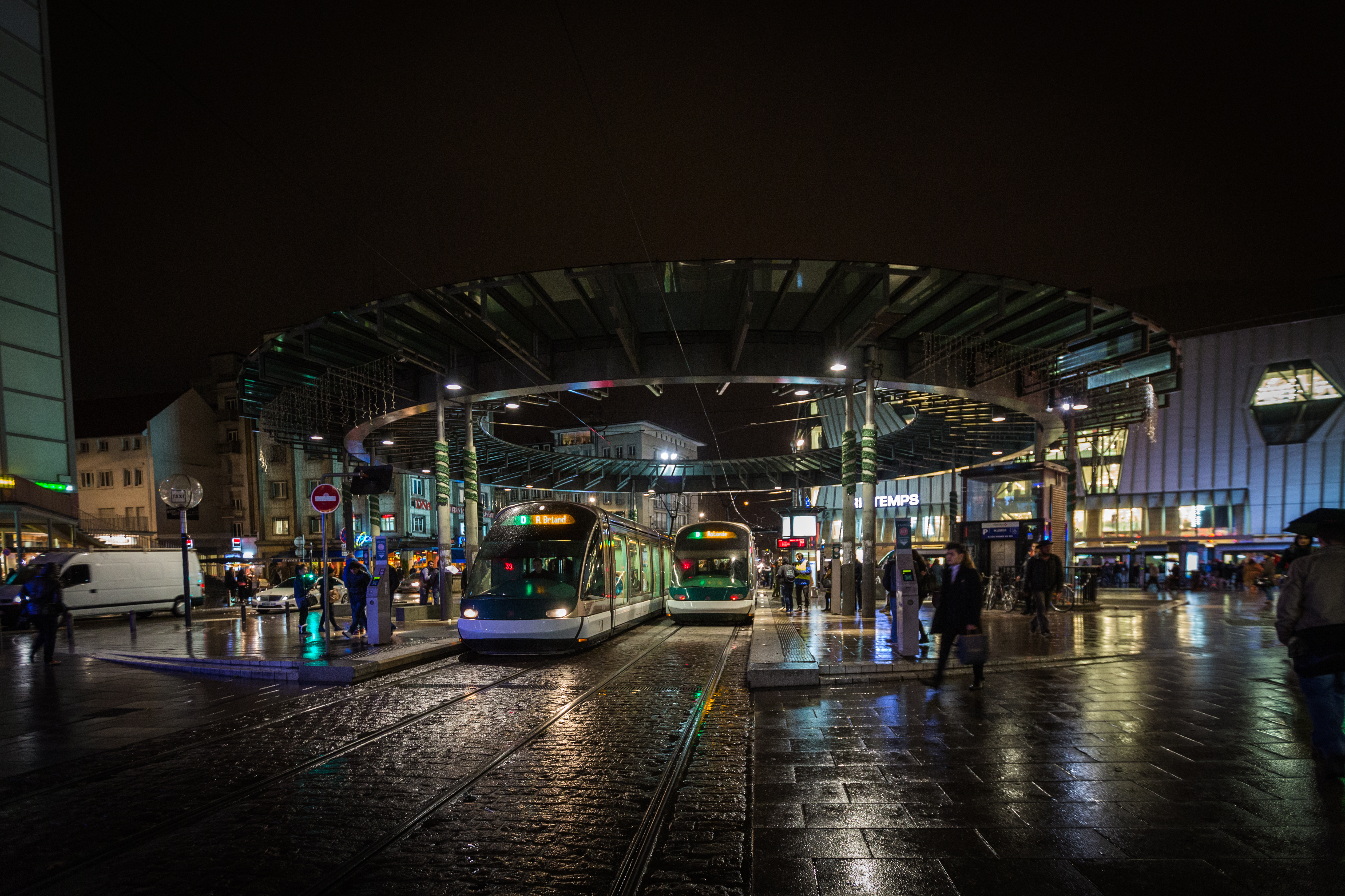 Strasbourg place de l’Homme-de-Fer novembre 2013.